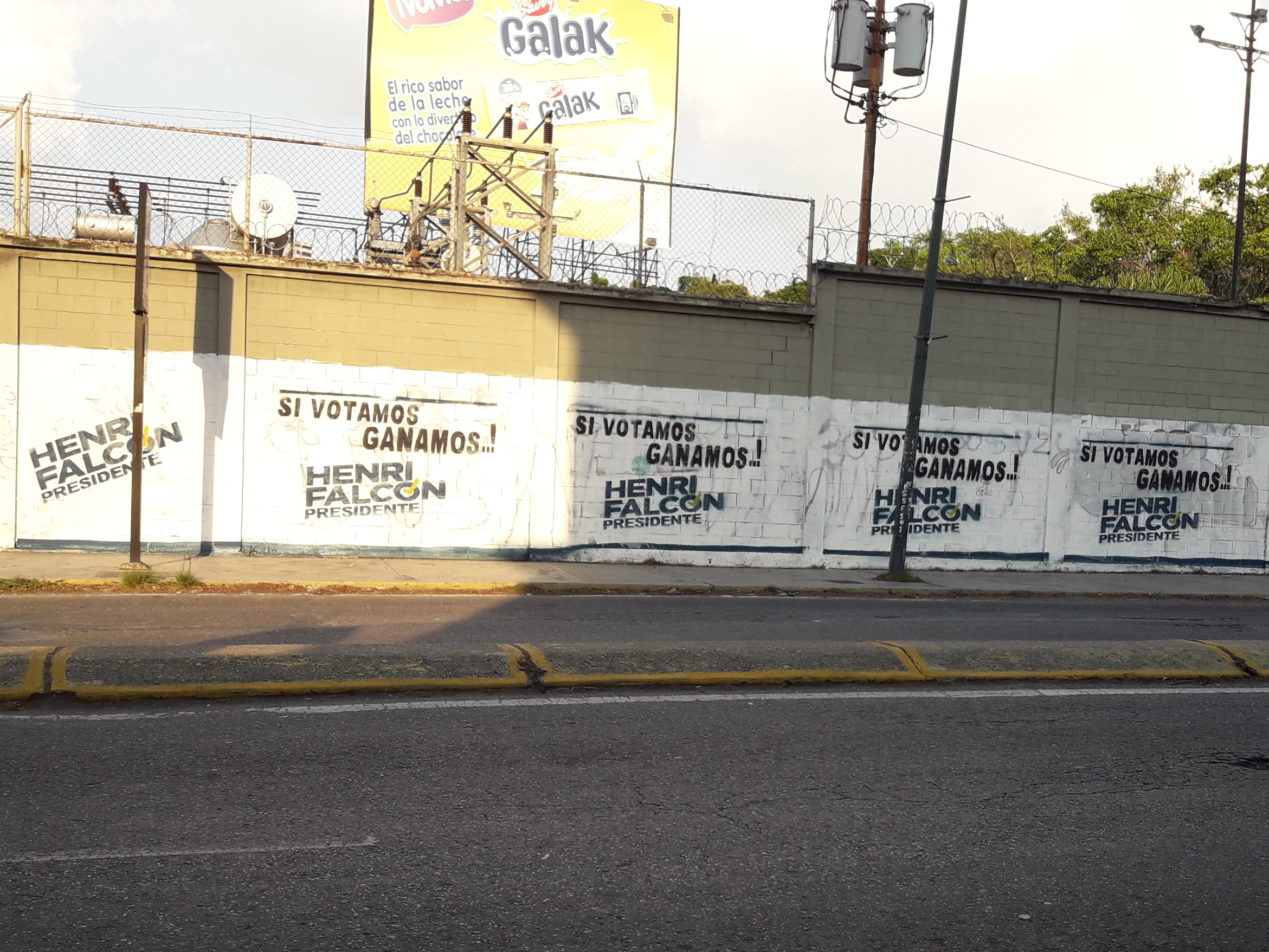 Murales en apoyo del candidato Henri Falcón en las elecciones presidenciales de Venezuela de 2018 en Caracas.